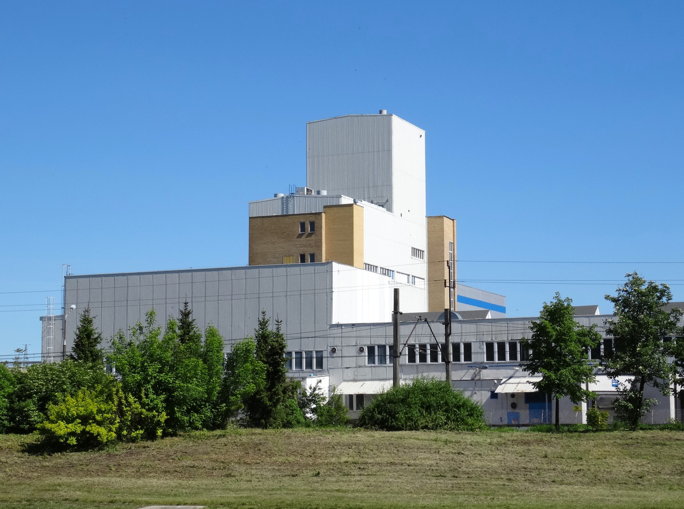 Fabryka Unilever S.A. przy ul. Kraszewskiego 20 w Bydgoszczy